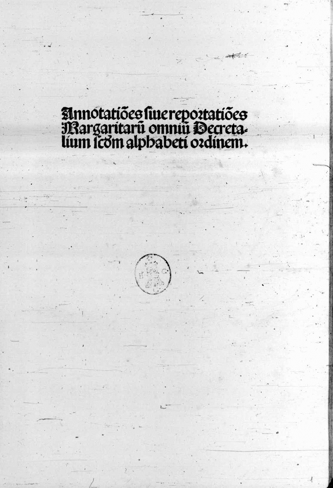 Occhietto